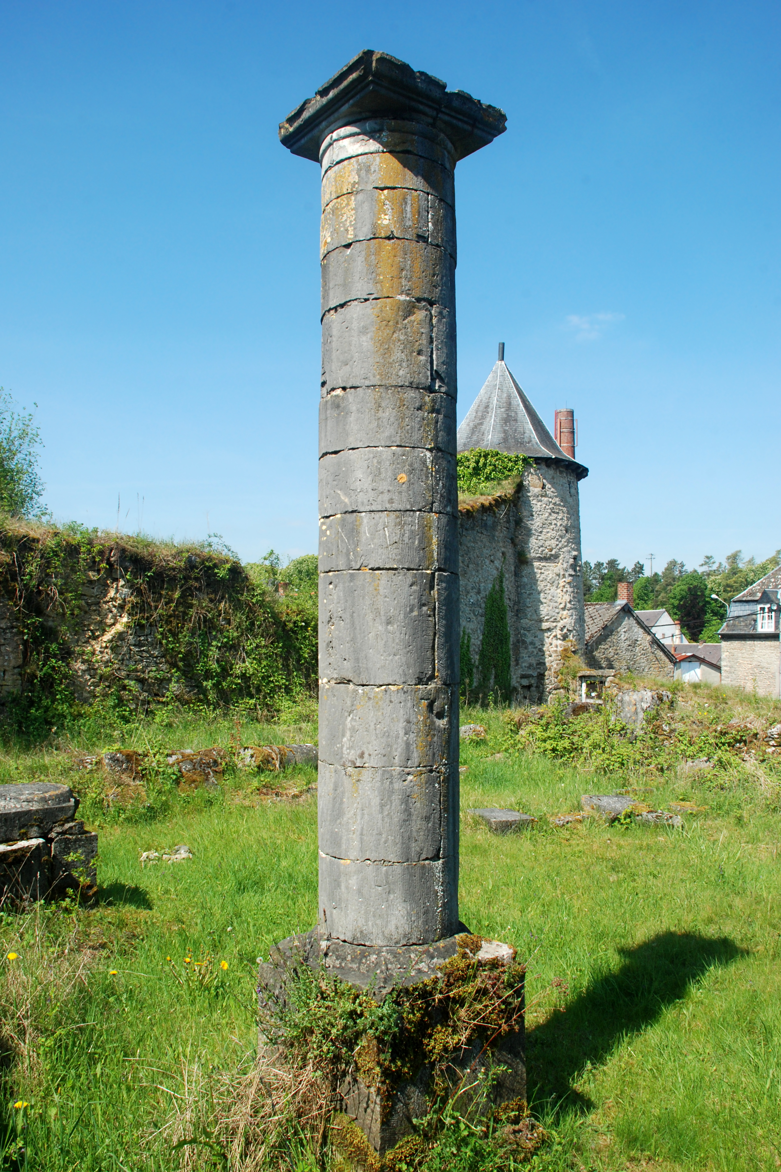 Belgique - Province de Namur - Viroinval - Nismes - Ancienne église Saint-Lambert (1606)